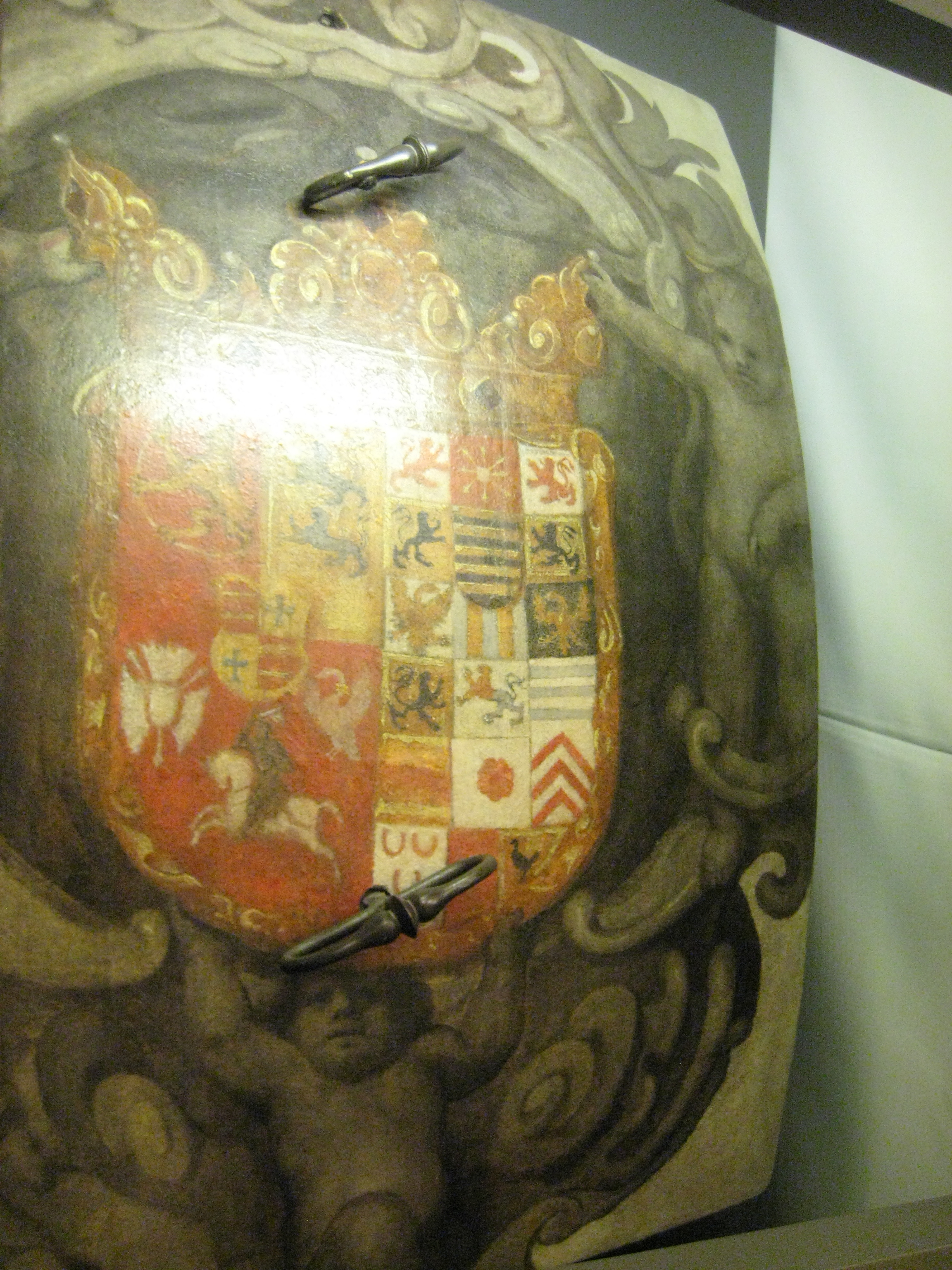 Готторпский глобус. Единственная сохранившаяся деталь первого глобуса — ныне в экспозиции Кунсткамеры. Это дверь, украшенная геральдическим щитом Гольштейн-Готторпского герцогства. На момент пожара дверца находилась в подвале и поэтому не пострадала. Во время Второй мировой войны она была вывезена в Германию, а в 1948 году возвращена.